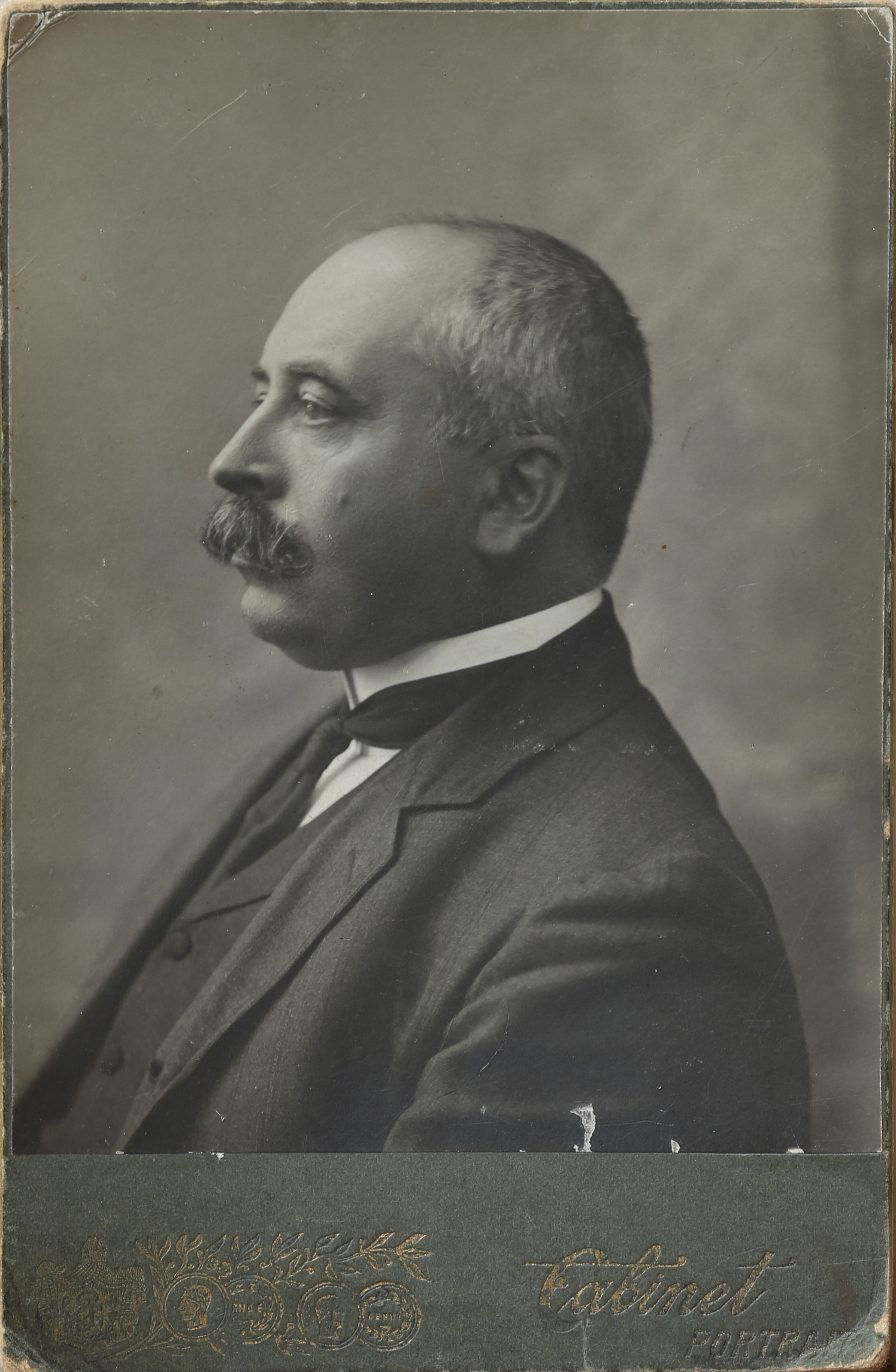 Józef Kazimierz Ziemacki (ur. 18 września 1856 w Wilnie, zm. 30 września 1925) profilowe